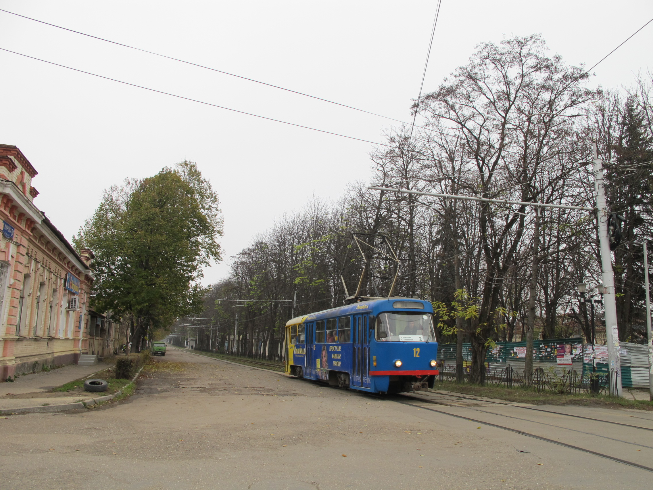 Проспект Кирова в Пятигорске